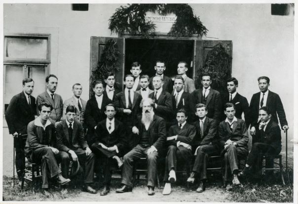 Ob odprtju 1. umetniške razstave v Novem mestu. Od leve proti desni sedijo: Fran Ančik, Miran Jarc, Anton Podbevšek, Rihard Jakopič, Božidar Jakac, Zdenko Skalicky, Marjan Mušič, Ferdo Avsec. V drugi vrsti stojijo: Emil Stefanovič, Jože Žabkar, Leon Štukelj, Emil Pureber, Slavko Šepic, Stanko Šproc, Fran Herman, Viktor Schweiger, Karel Pleiweis, Ljubo Stefanovič, Ermin Teply, Slavko Kvas. V tretji vrsti stojijo: Marijan Polenšek, Stanko Schweiger, Karel Barborič. Fotografijo hrani Knjižnica Mirana Jarca Novo mesto.